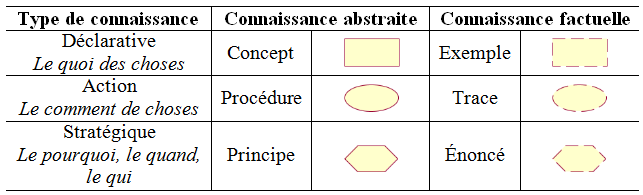 Tableau des entités de MOT